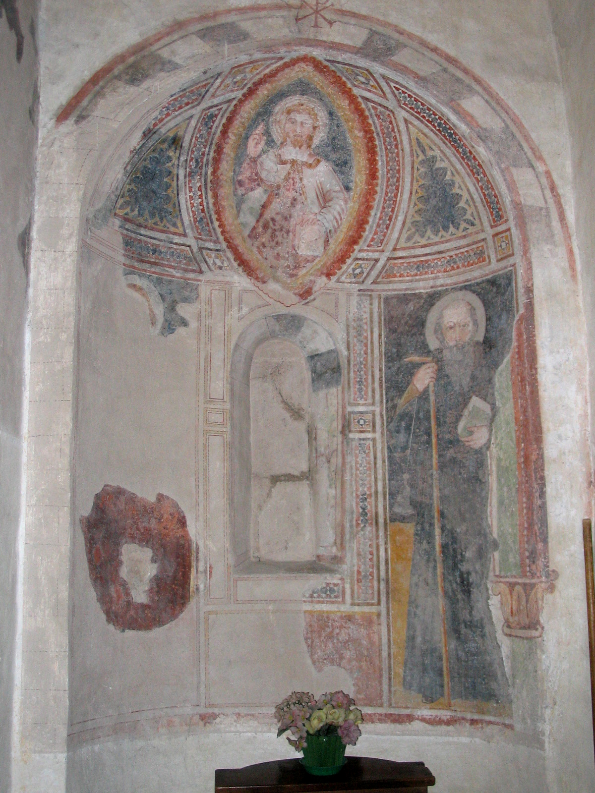 Autore Giorces. Almenno San Salvatore, la Pieve, ambone particolare.